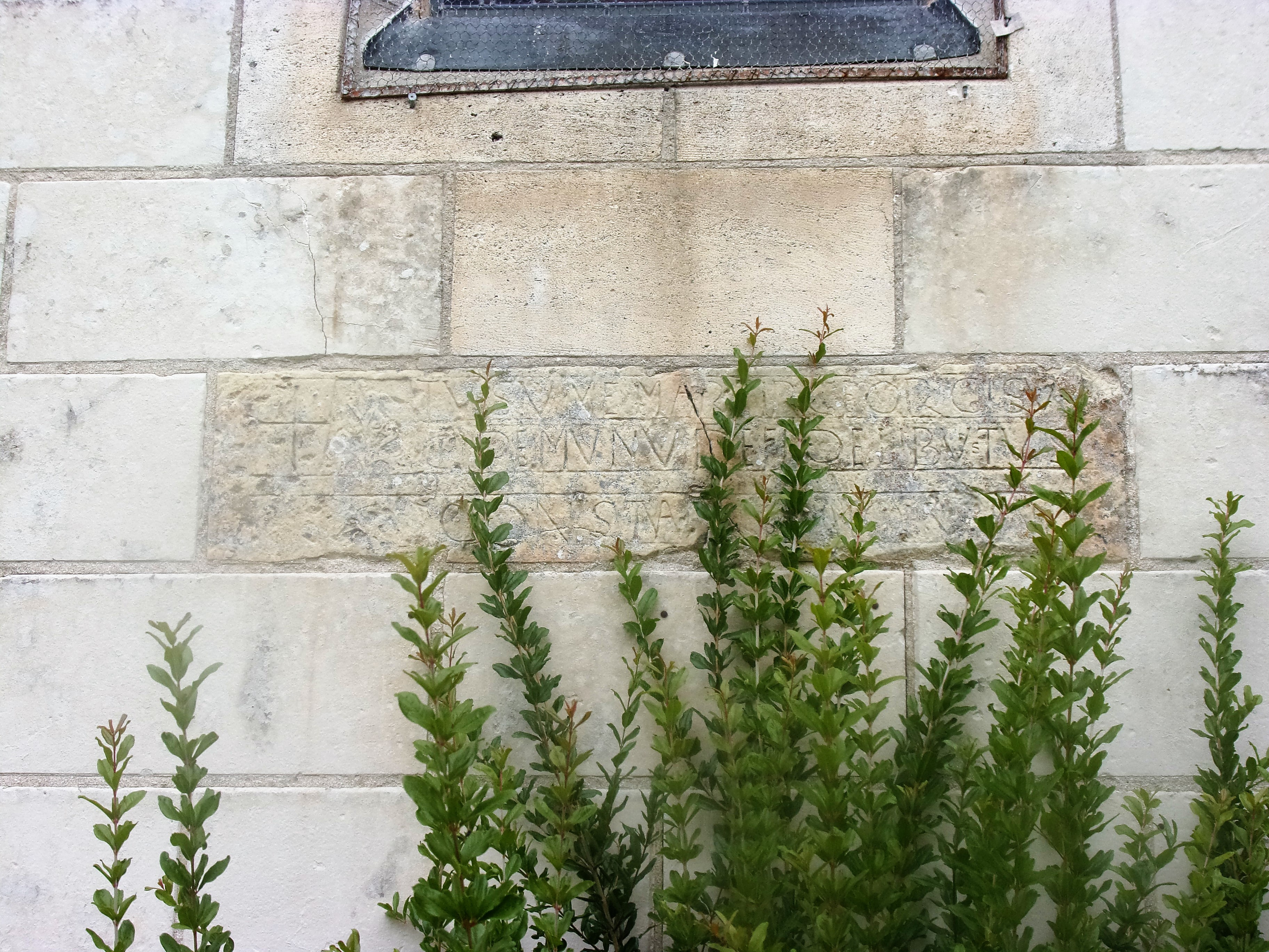 Linteau de l'église médiéval en remploi dans l'église actuelle